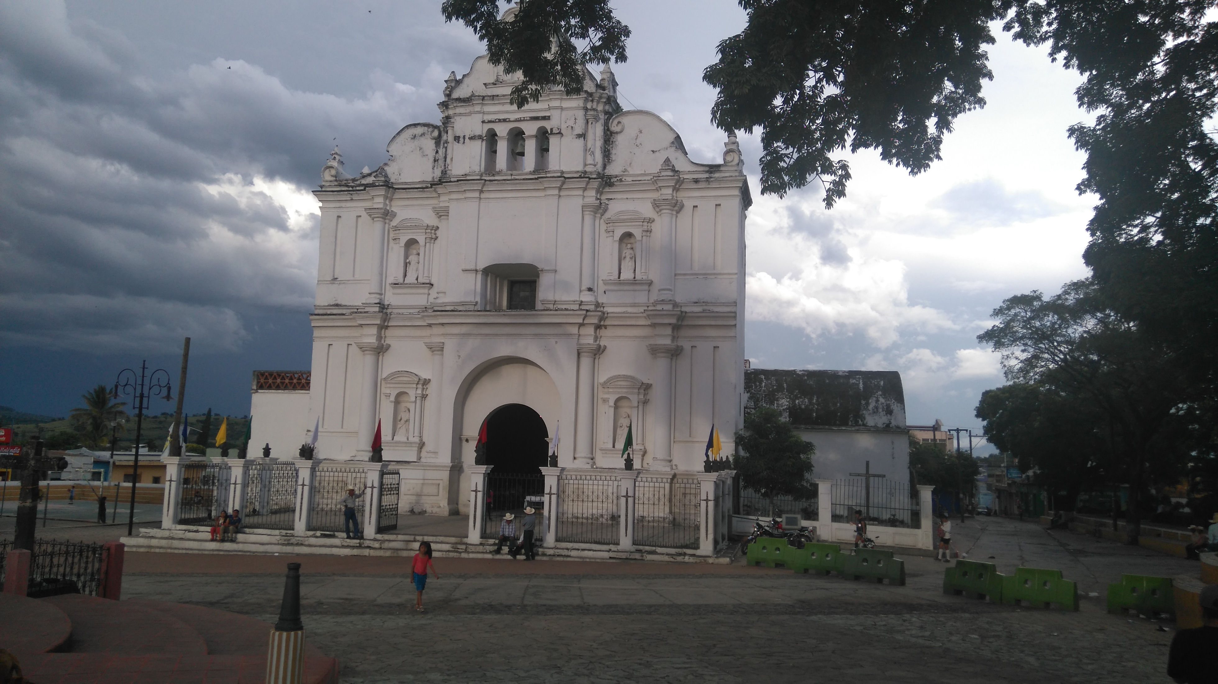 Julio, 2016